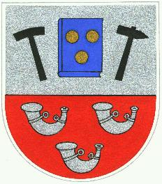 Wappen von Norath